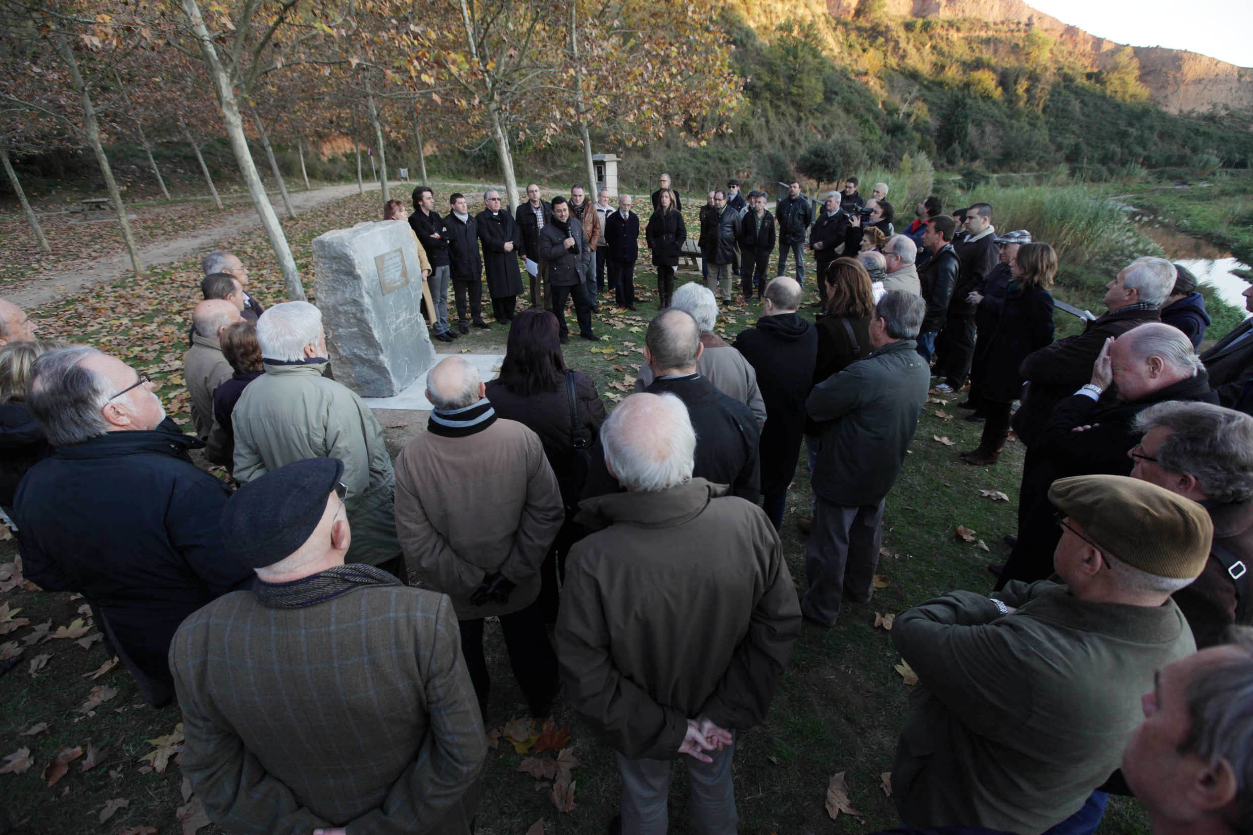 Inauguracio del monolit colocat al moli de ca n'amat en record a les victimes de les riuades del 1962